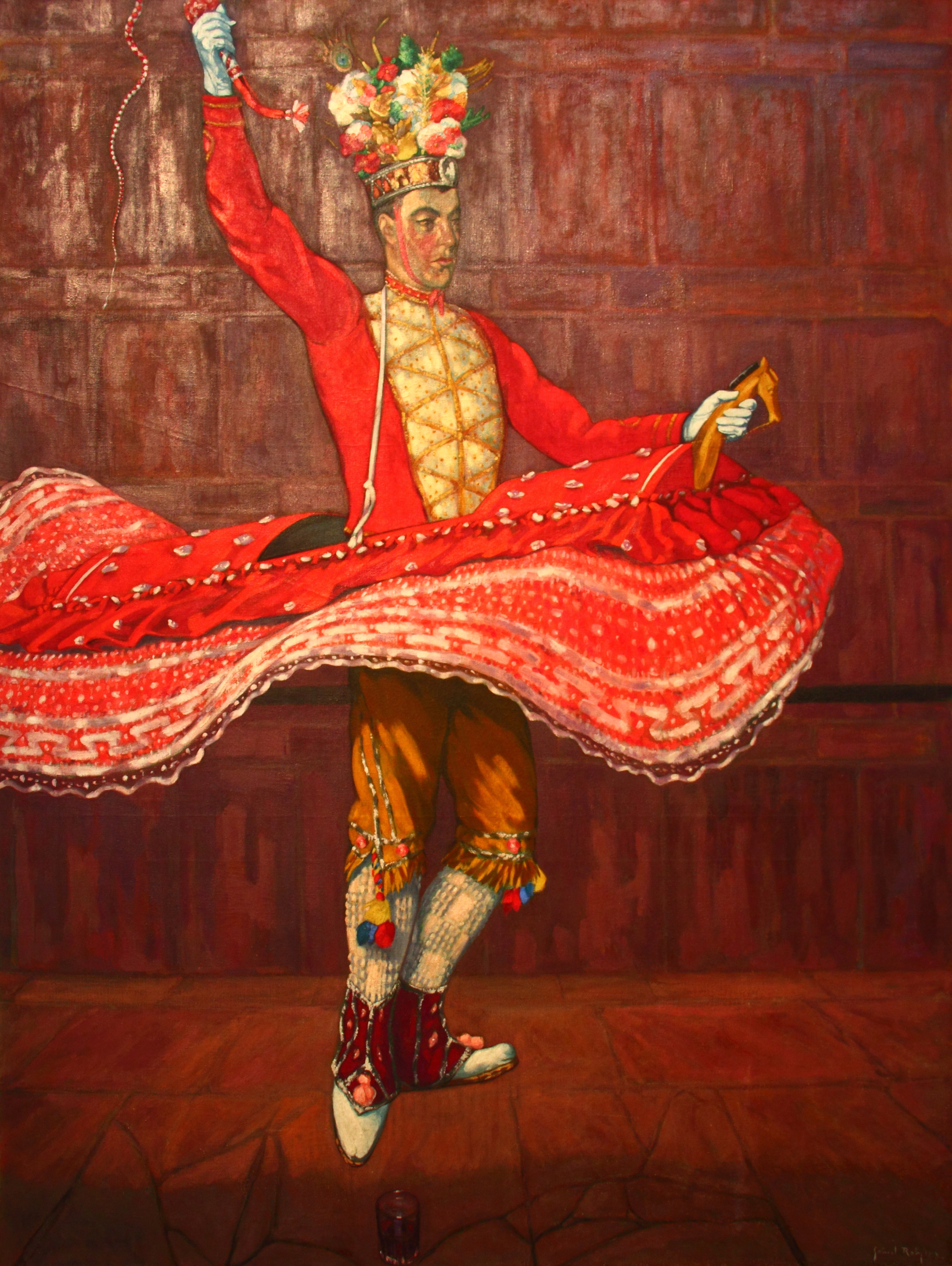 Peinture de Gabriel Roby, 1914 Homme-cheval, l'un des personnages principaux de la mascarade souletine, effectuant la danse du verre